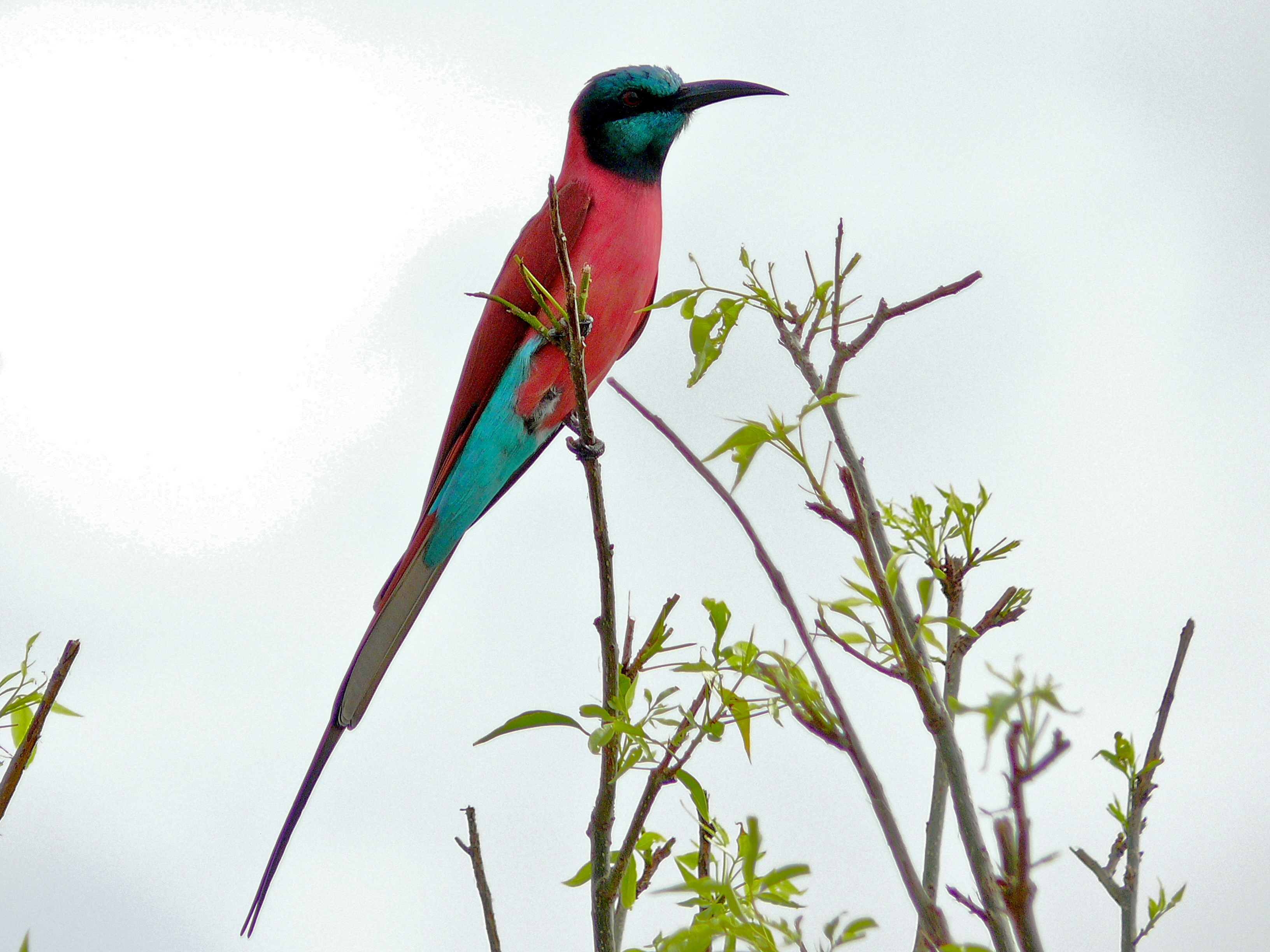 Murchison Falls NP, UGANDA